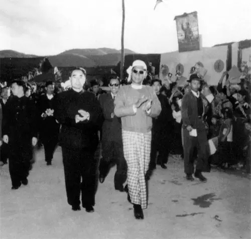 中文（中国大陆）: 1956中缅边民联欢大会，中缅总理周恩来和吴巴瑞步入会场